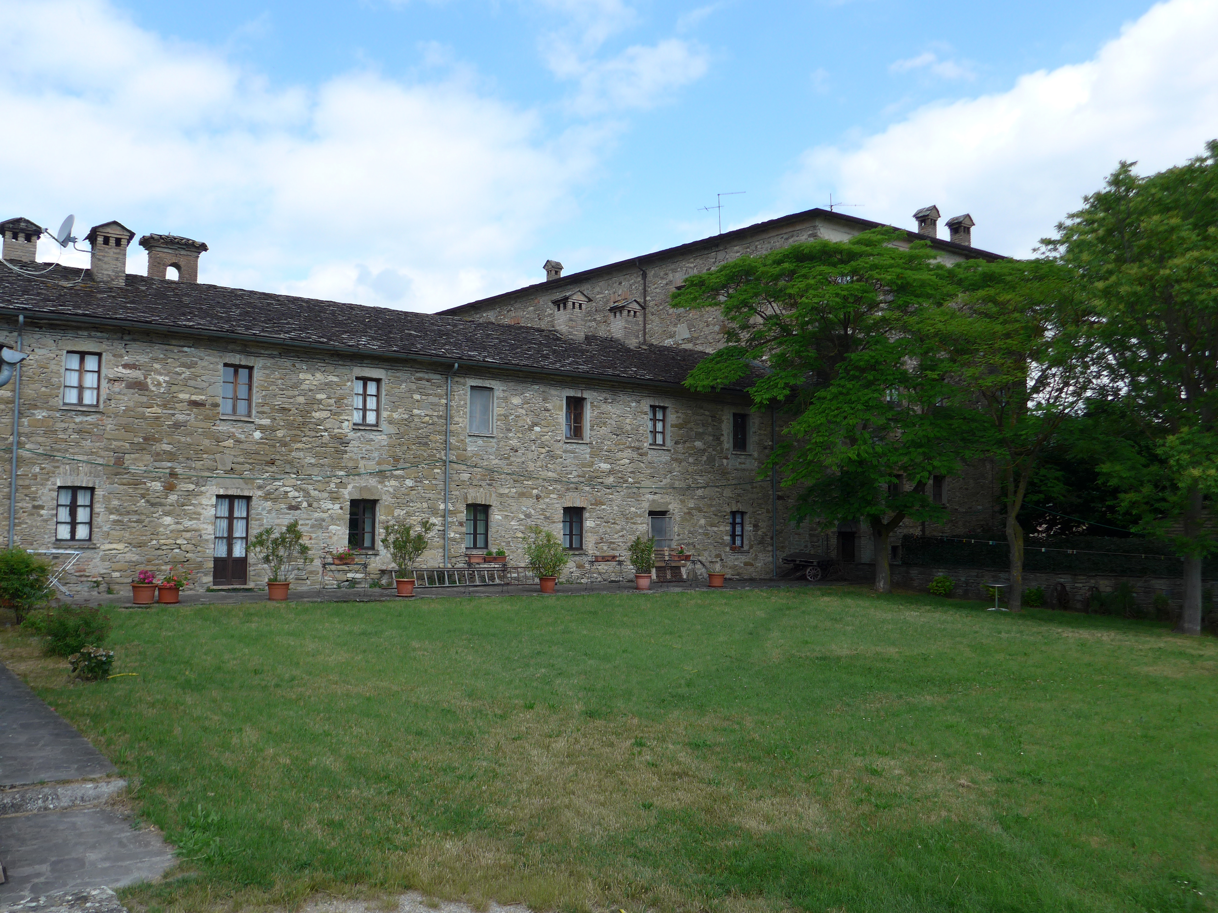 Varsi, castello di Golaso.